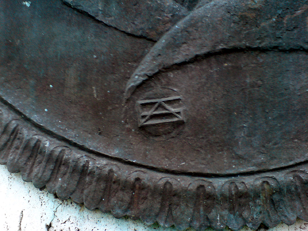 Künstlermonogramm F A S für Friedrich Adolf Sötebier auf dem 1950 geschaffenen Portraitmedaillon für Johann Gerhard Helmcke am Helmcke-Denkmal, Herrenhäuser Allee/Ecke Schneiderberg/Franzius-Institut